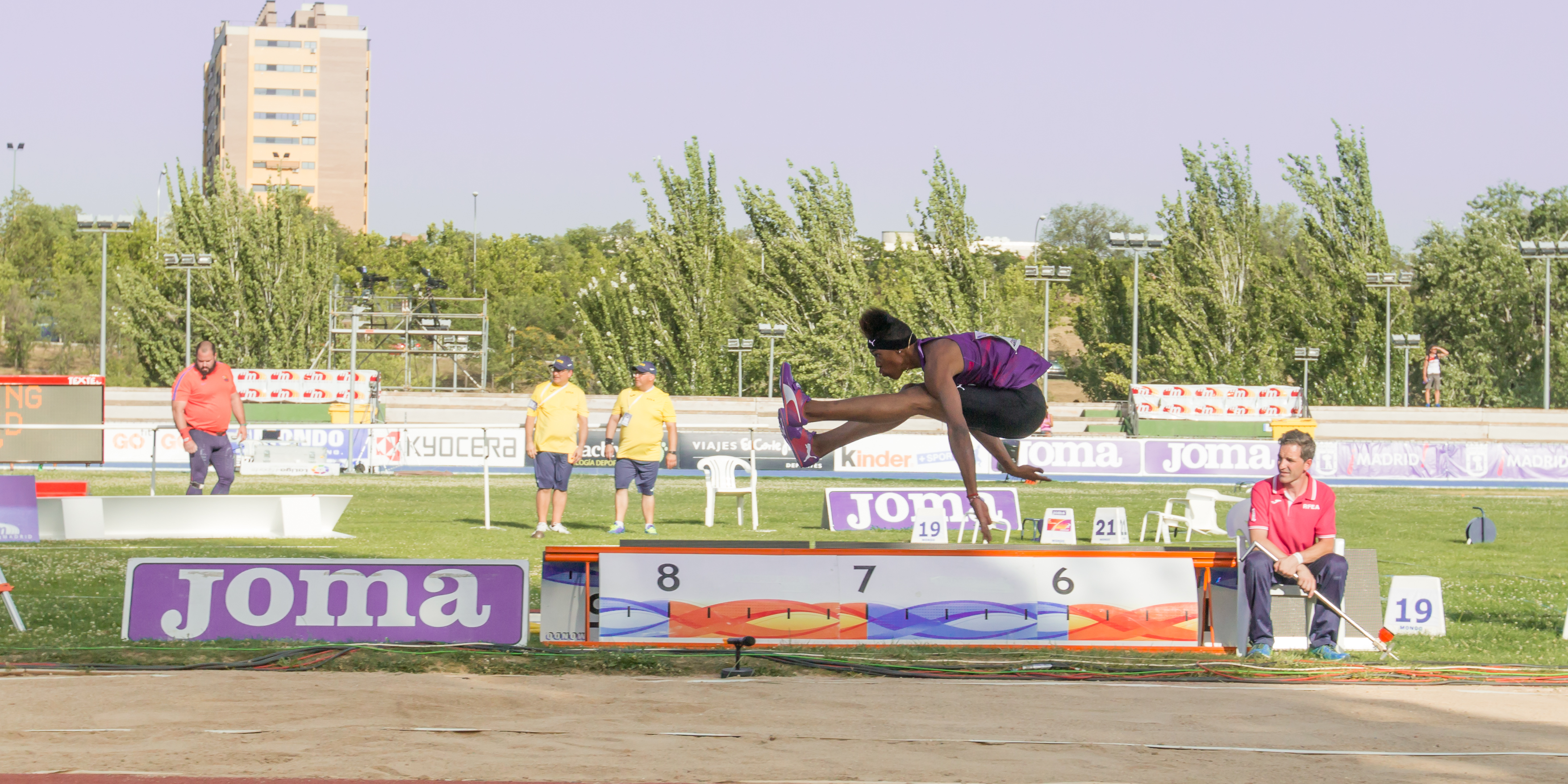 Juan Miguel Echevarría (CUB). Salto en largo. IAAF World Challenge. Meeting Madrid 2017. Moratalaz, Madrid.